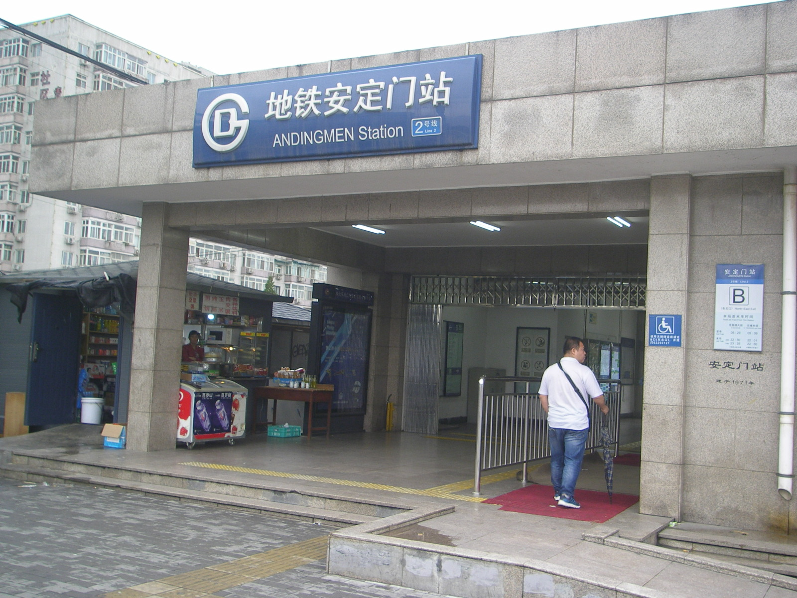 Andingmen station 201705